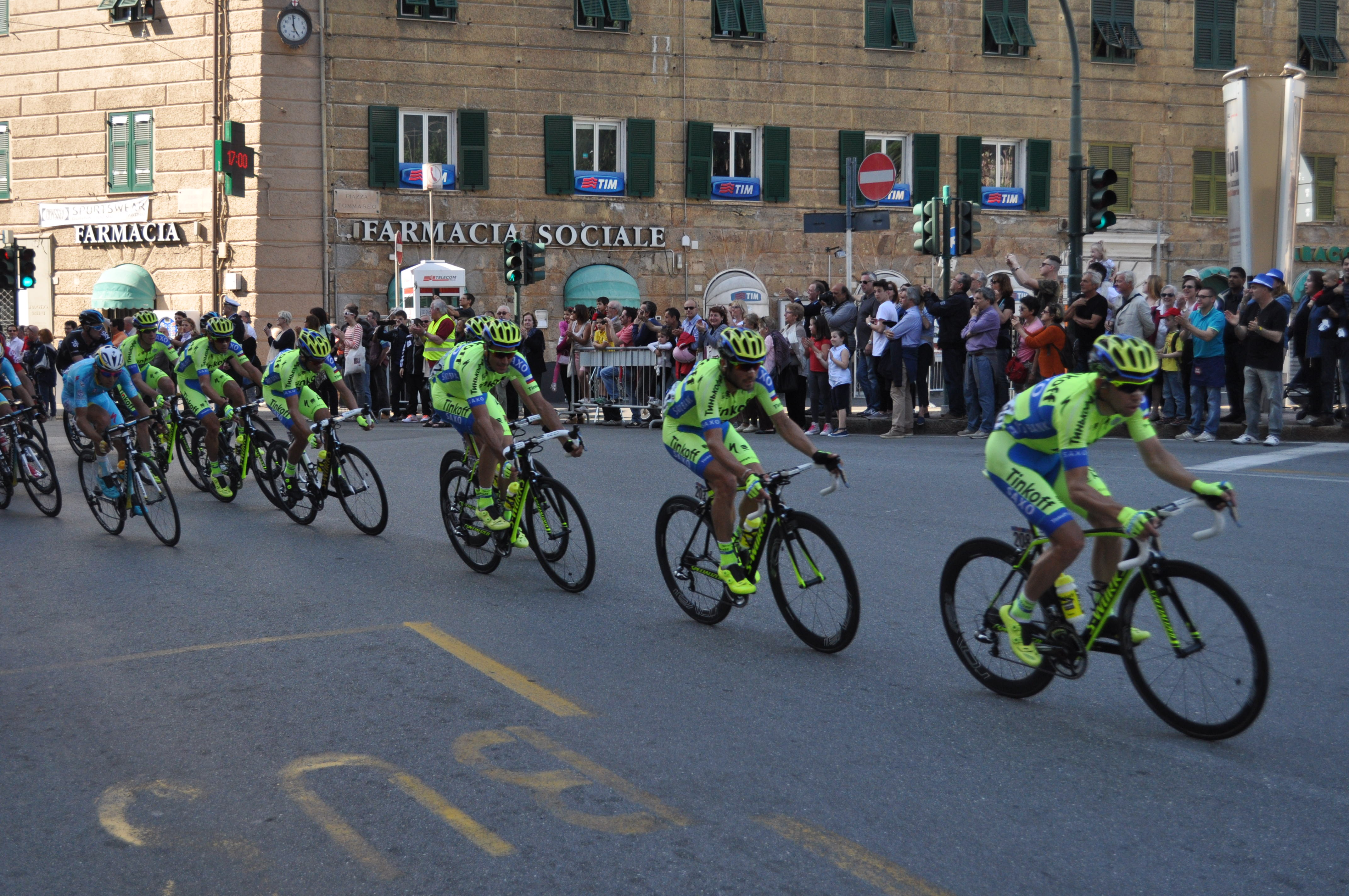 Il gruppo durante un passaggio in piazza Tommaseo, Genova, città arrivo della seconda tappa del Giro d'Italia 2015.